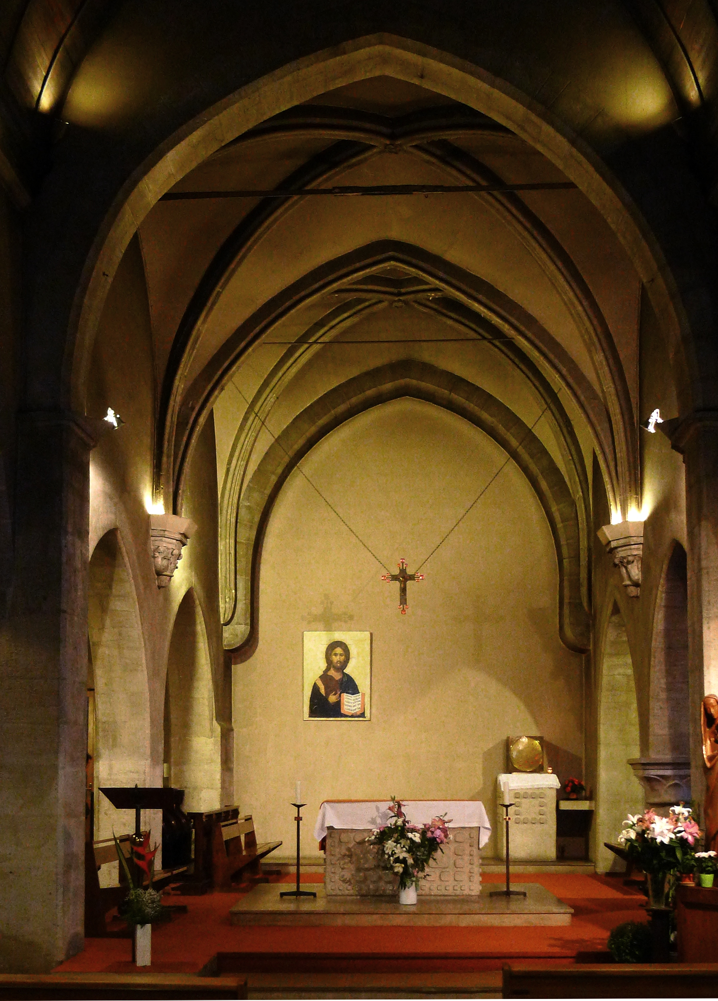 Eglise Saint-Denys-de-la Chapelle (choeur) - Paris XVIII